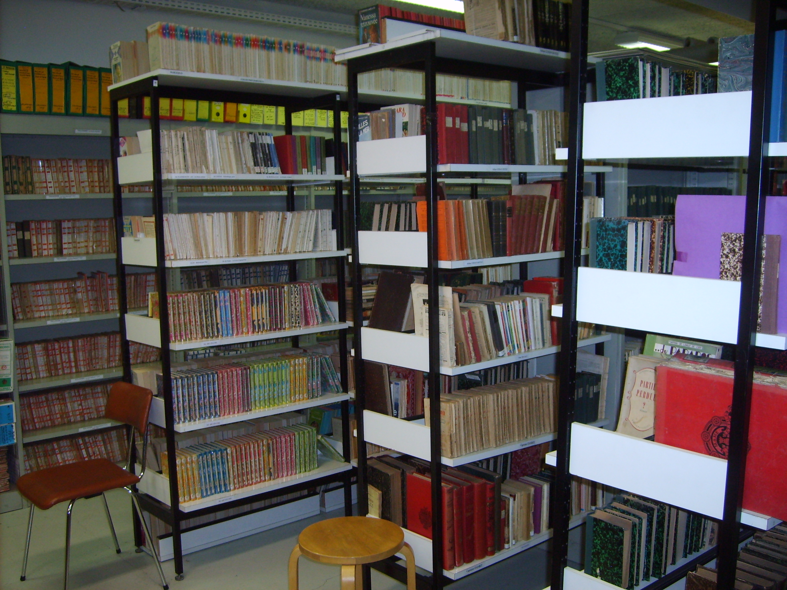 Rayonnages de la Bibliothèque européenne du roman populaire (Laxou, Meurthe-et-Moselle)